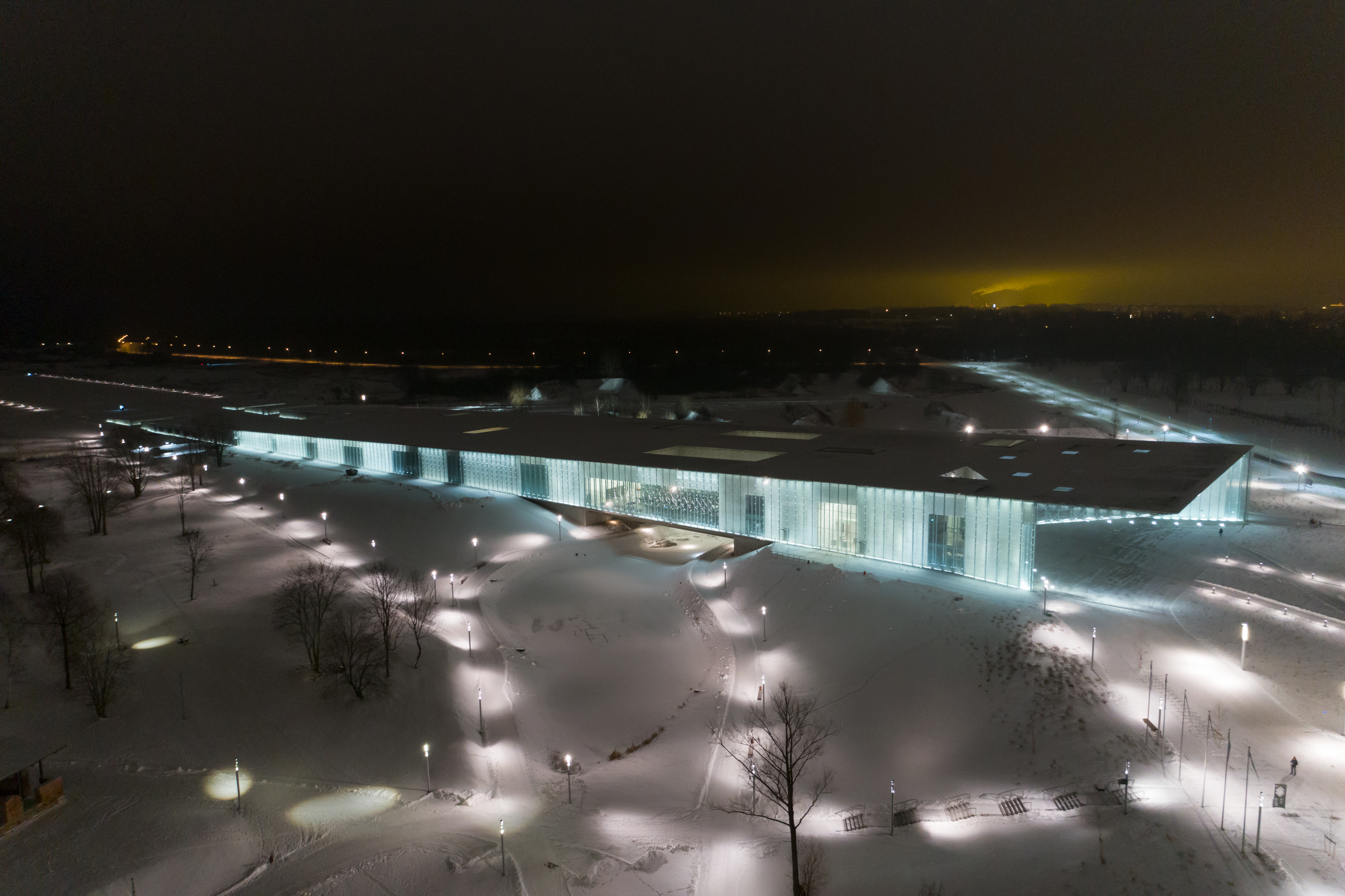 Eesti Rahva Muuseumi peahoone